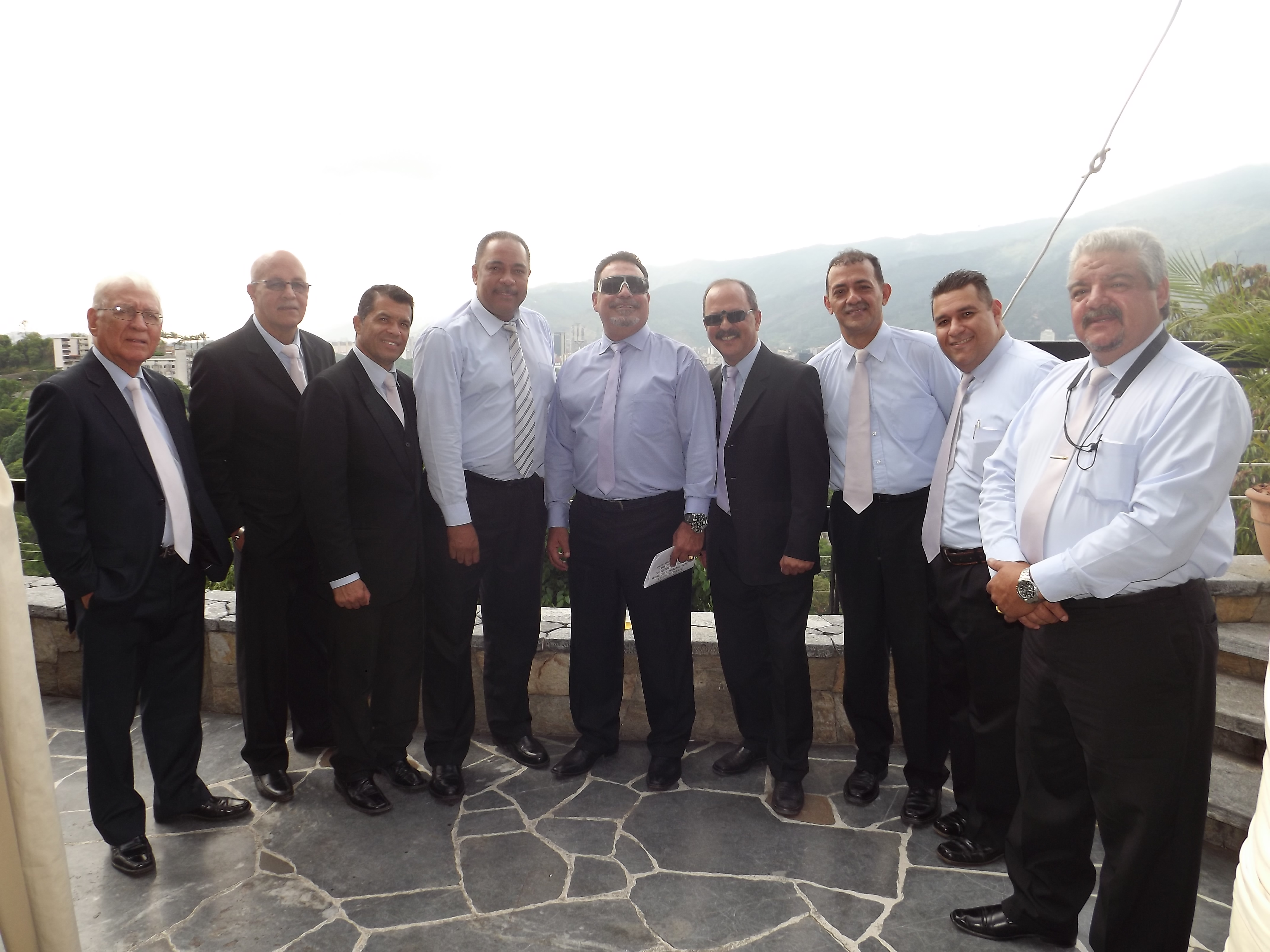 Miembros de La Rondalla Venezolana (2016)